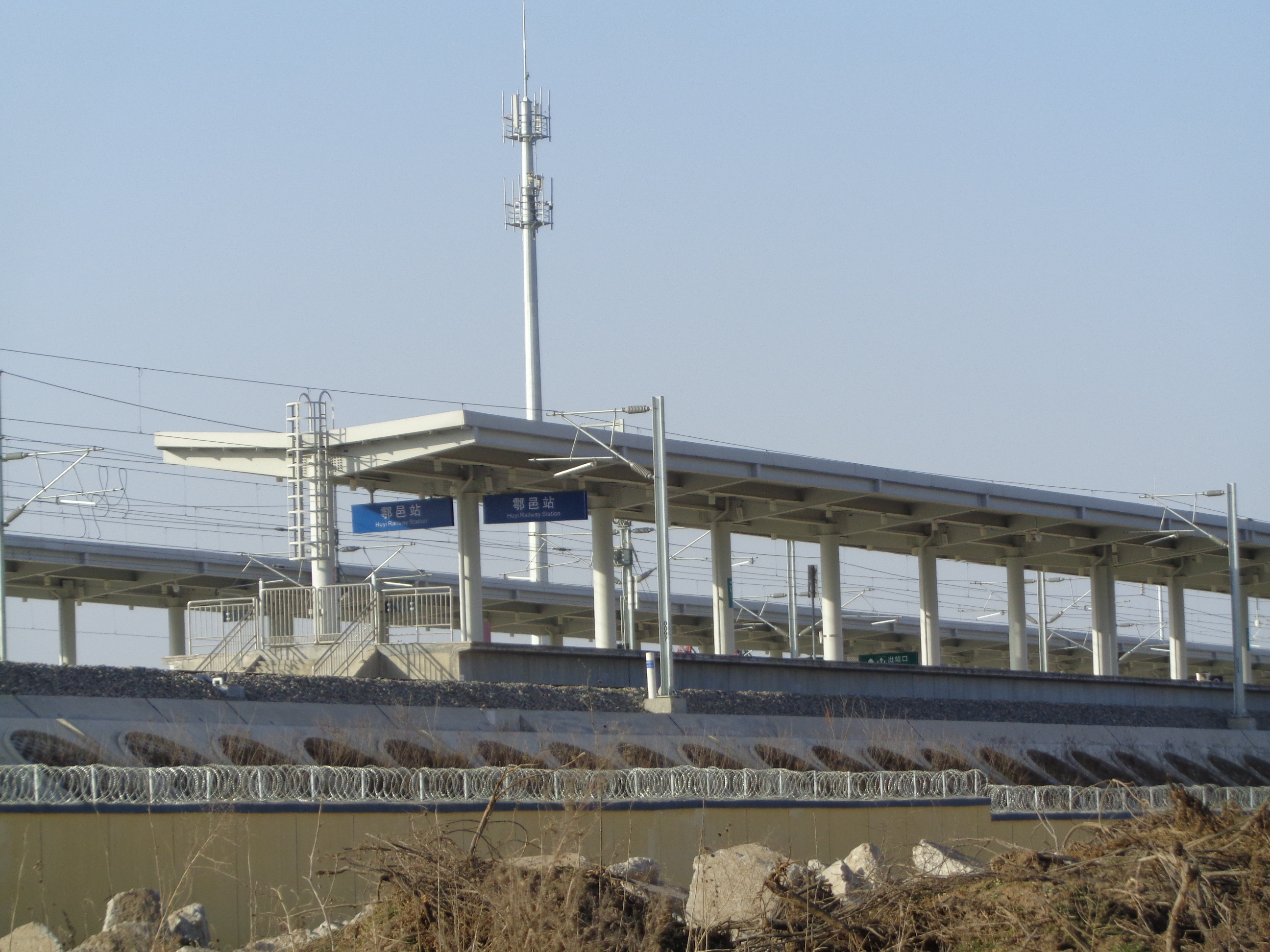 西安市鄠邑区秦渡镇鄠邑站